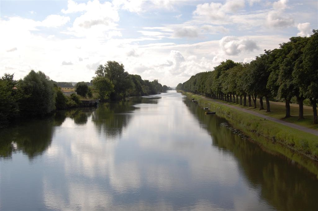 Het Canal-de-la-Somme bekeken vanuit Valery-sur-Somme